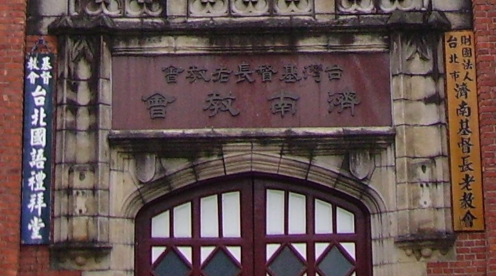 台灣基督長老教會濟南教會大門字牌。